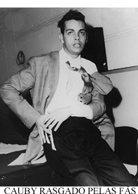 Na foto de 1957, Cauby Peixoto rasgado por fãs. O assedio se tornou constante depois de 1955.